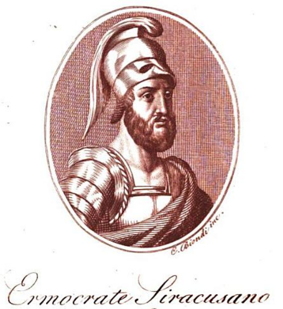 Ritratto di Ermocrate